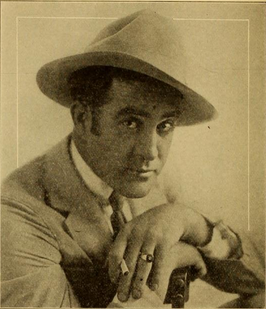 Fotografía del actor y director Francis Ford